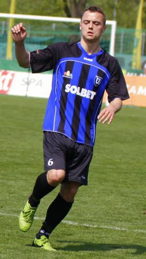 Michał Masłowski w barwach Zawiszy Bydgoszcz